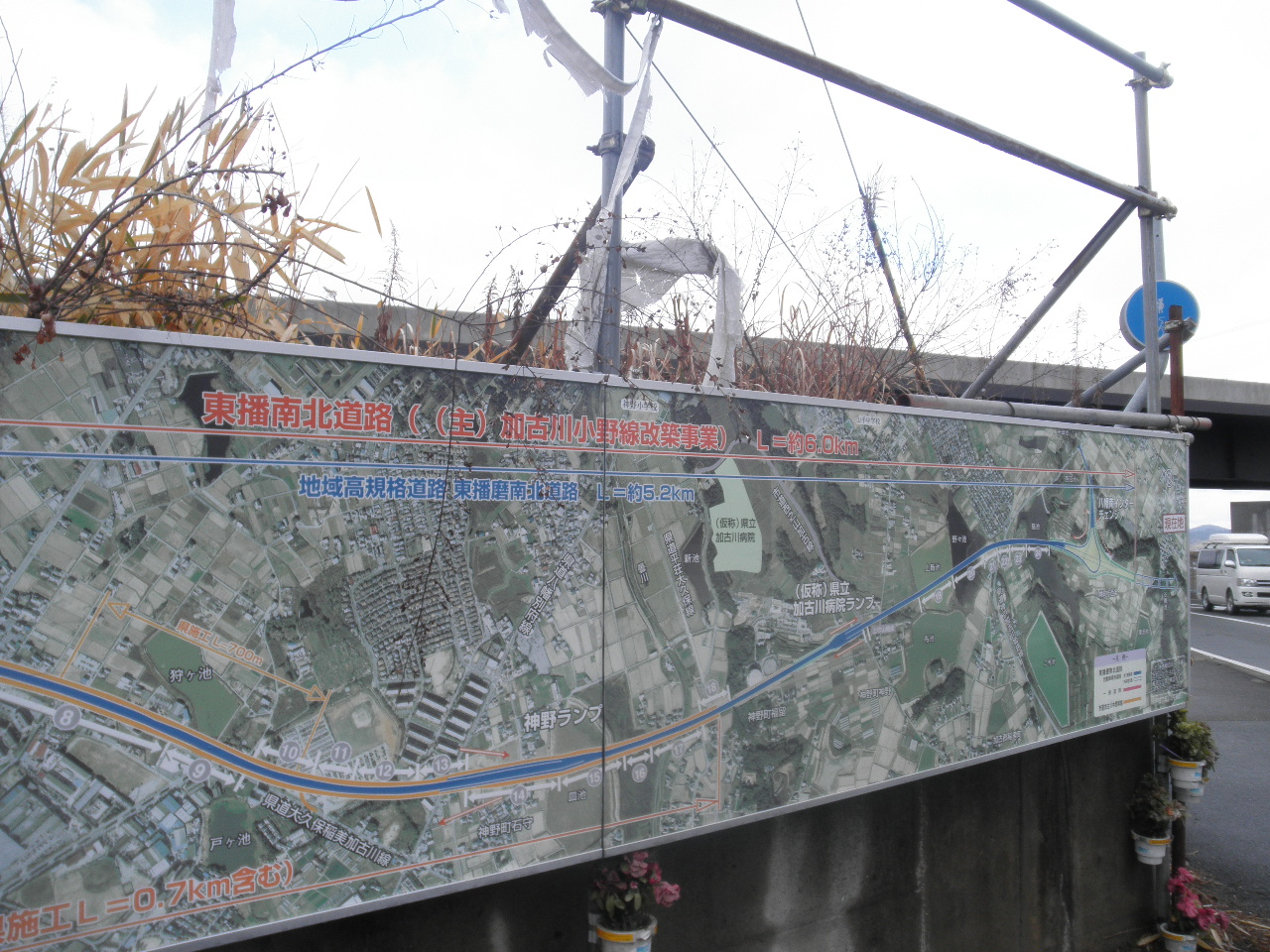 兵庫県加古川市八幡町上西条 東播磨南北道路 看板